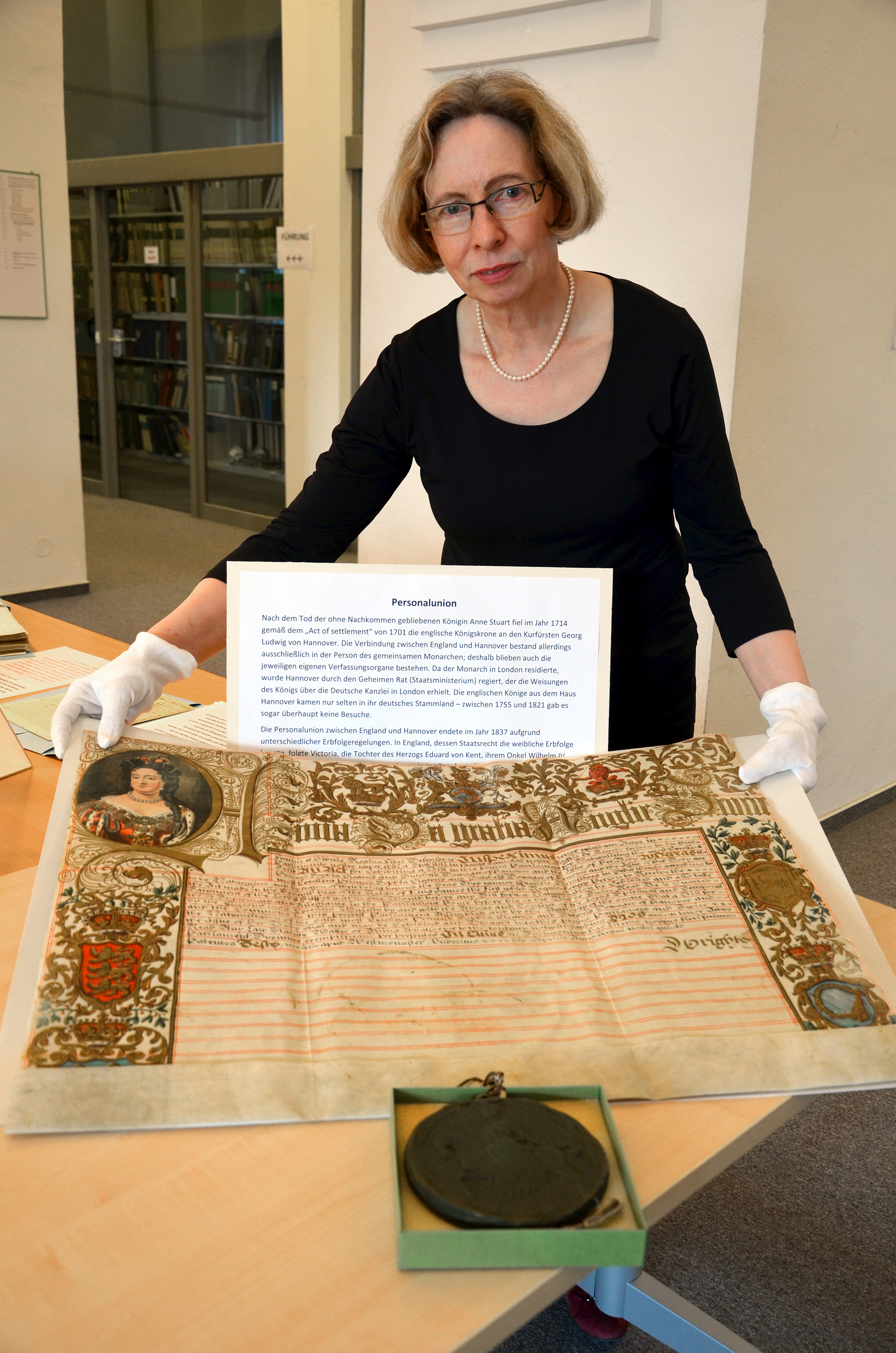 Am Tag der Archive präsentierte das Niedersächische Landesarchiv in ihren Räumlichkeiten Am Archiv 1 in Hannover zahlreiche Exponate aus den Beständen. Hier präsentiert die Direktorin Christine van den Heuvel mit Glacéhandschuhen ein Facsimile der Sukzessionsurkunde der britischen Königin Anna von England, Schottland, Frankreich und Irland für die hannoversche Kurfürstin Sophie, durch die das Haus der Welfen auf den englischen Thron gelangte. Das Original der Prunkurkunde auf Pergament in den Maßen 77 x 55 cm ist mit dem Miniaturbildnis der Ausstellerin geschmückt (stark abweichend von der gleichzeitigen Urkunde Cal. Or. 63 Nr. 4 „Act for the naturalization …“) und trägt anhängend ein gut erhaltenes Staatssiegel von grünem Wachs (Silberkapsel verloren). Die Urkunde bestätigte den "Act for exhibiting a bill in this present parliament for naturalizing the ... princess Sophia, electress ... of Hannover" , wodurch die Kurfürstin Sophie und ihre Nachkommen von der Vorschrift der Eidesablage in England binnen eines Monats vor der Naturalisation entbunden wurden. Datum: 1706 April 11, Westminster. Das Original dieser Urkunde trägt die Archivsignatur NLA Hannover Cal. Or. 63 Nr. 5 ...